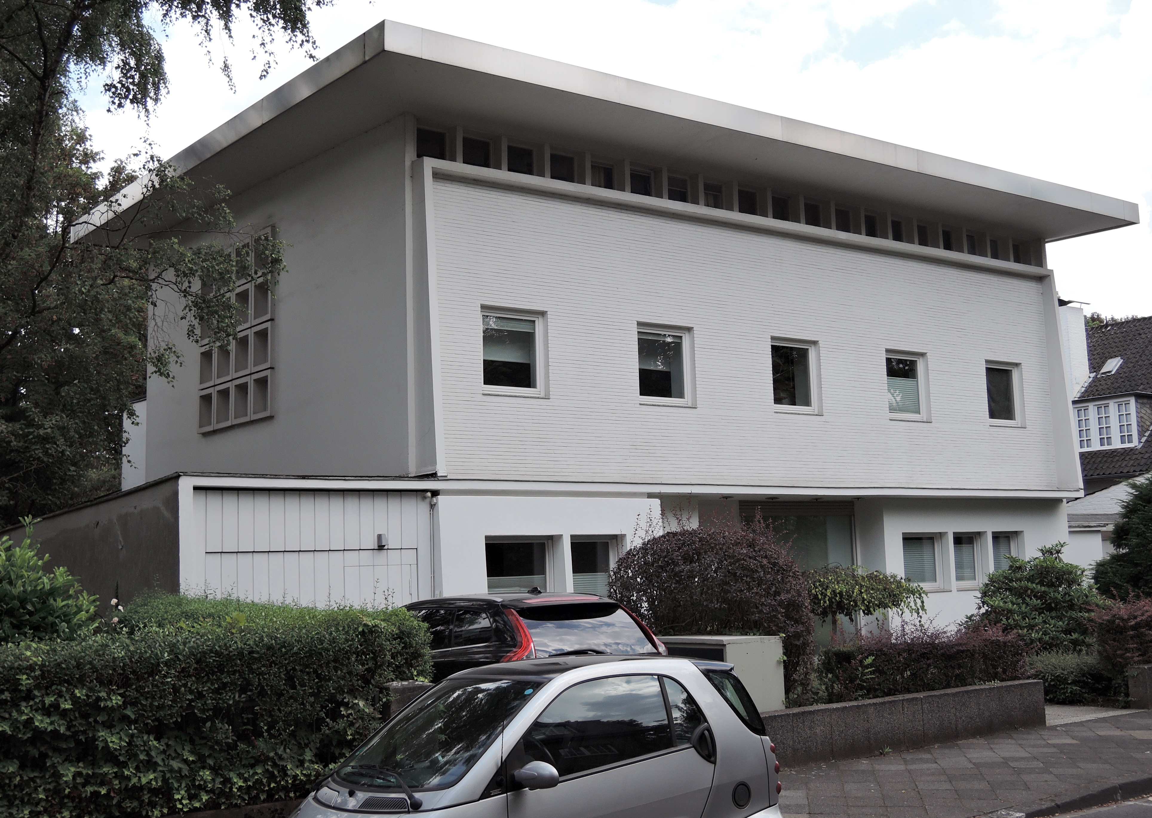 Düsseldorf Freytagstraße 4